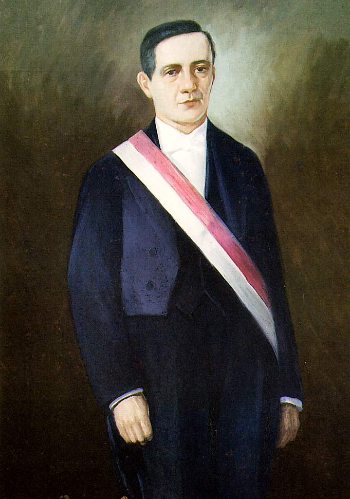 Antonio Arenas (1808-1891), abogado, jurista y político peruano. Fue ministro de Estado, presidente del gabinete ministerial, presidente del Congreso, vocal y presidente de la Corte Suprema. Fue presidente interino del Perú de 1885 a 1886.